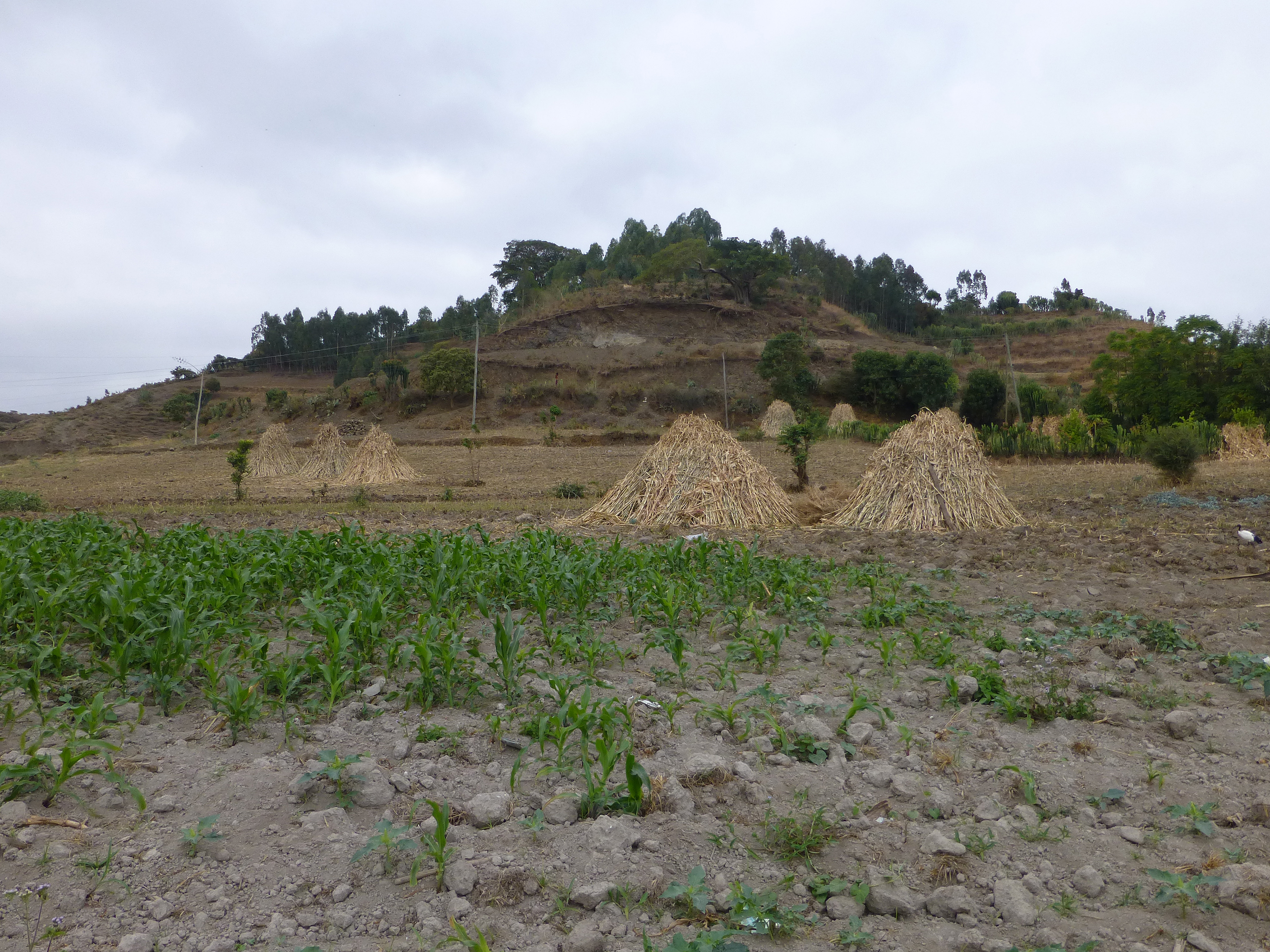 Meules de sorgho sur les rives du lac Haïk (région Amhara, Ethiopie)